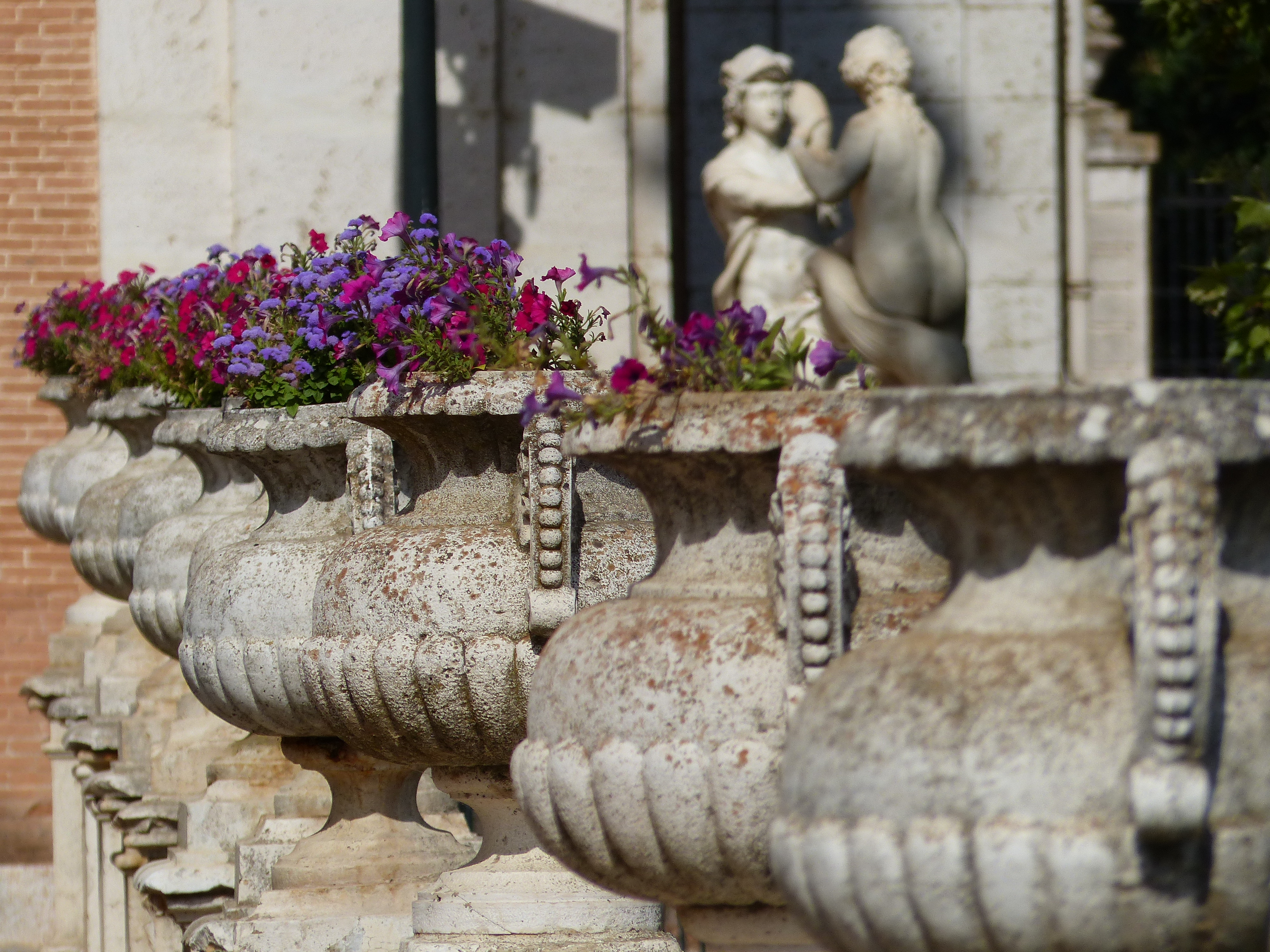 Exterior del Palacio de Aranjuez, detalles